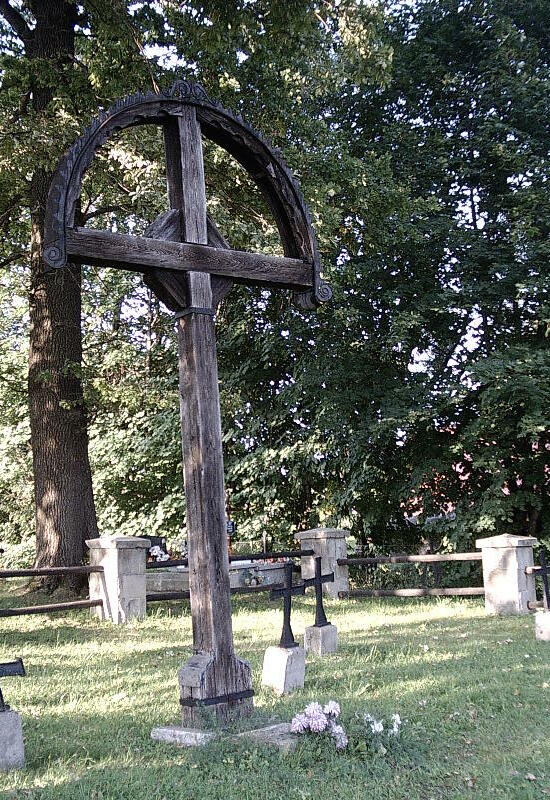 Cmentarz wojenny nr 82 Męcina Wielka